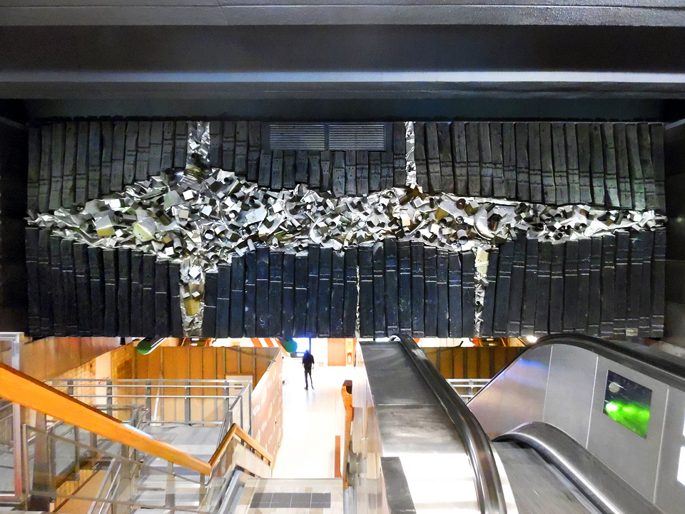 Station de métro Rihour à Lille, fresque de Michel Degand de 100 m2, acier inox et traverses de chemin de fer.